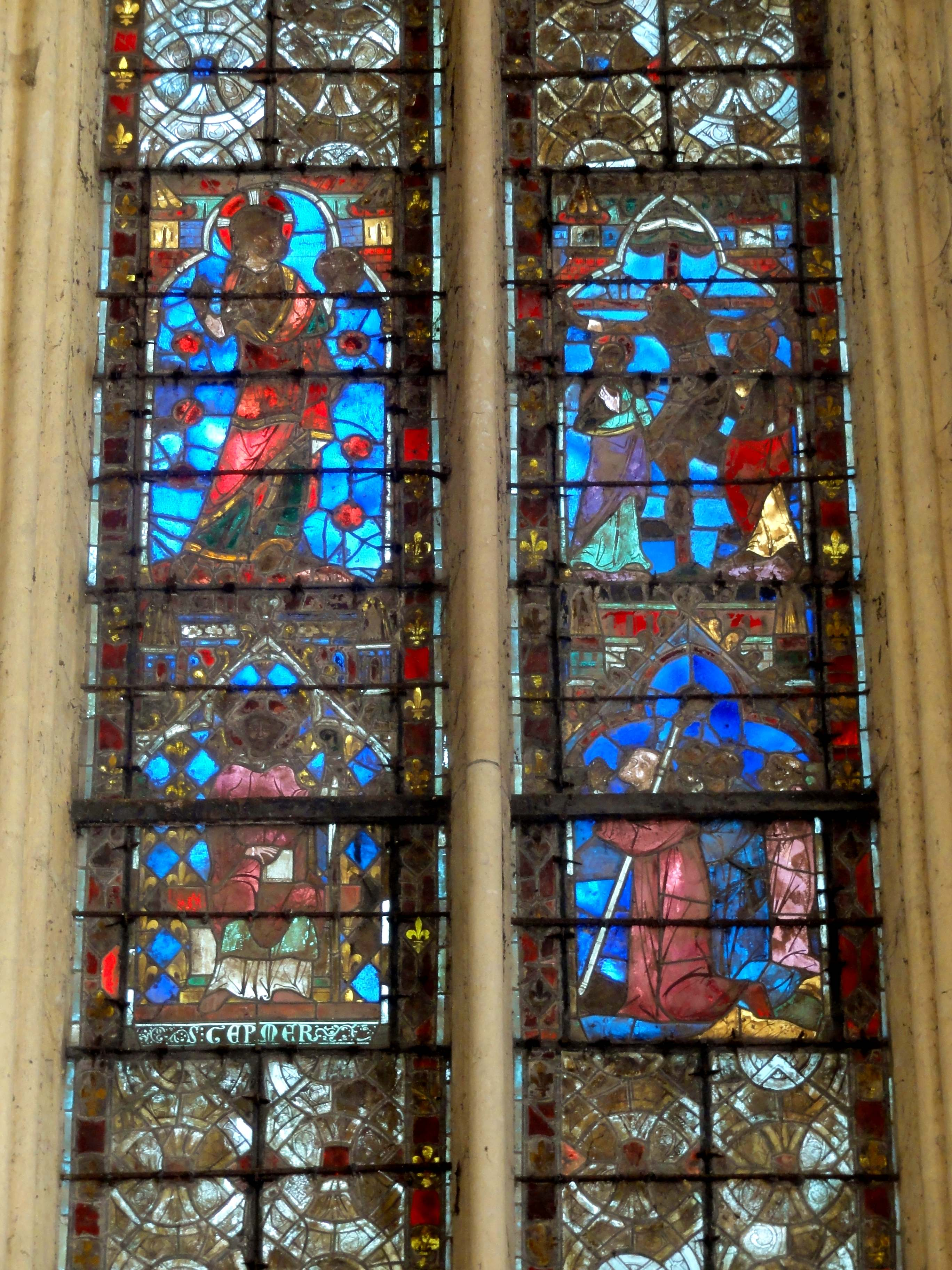 Vitraux classés de l'abside de la chapelle de la Vierge (Sainte-chapelle) du XIIe, XIIIe et XVIe siècle - voir le titre du fichier.